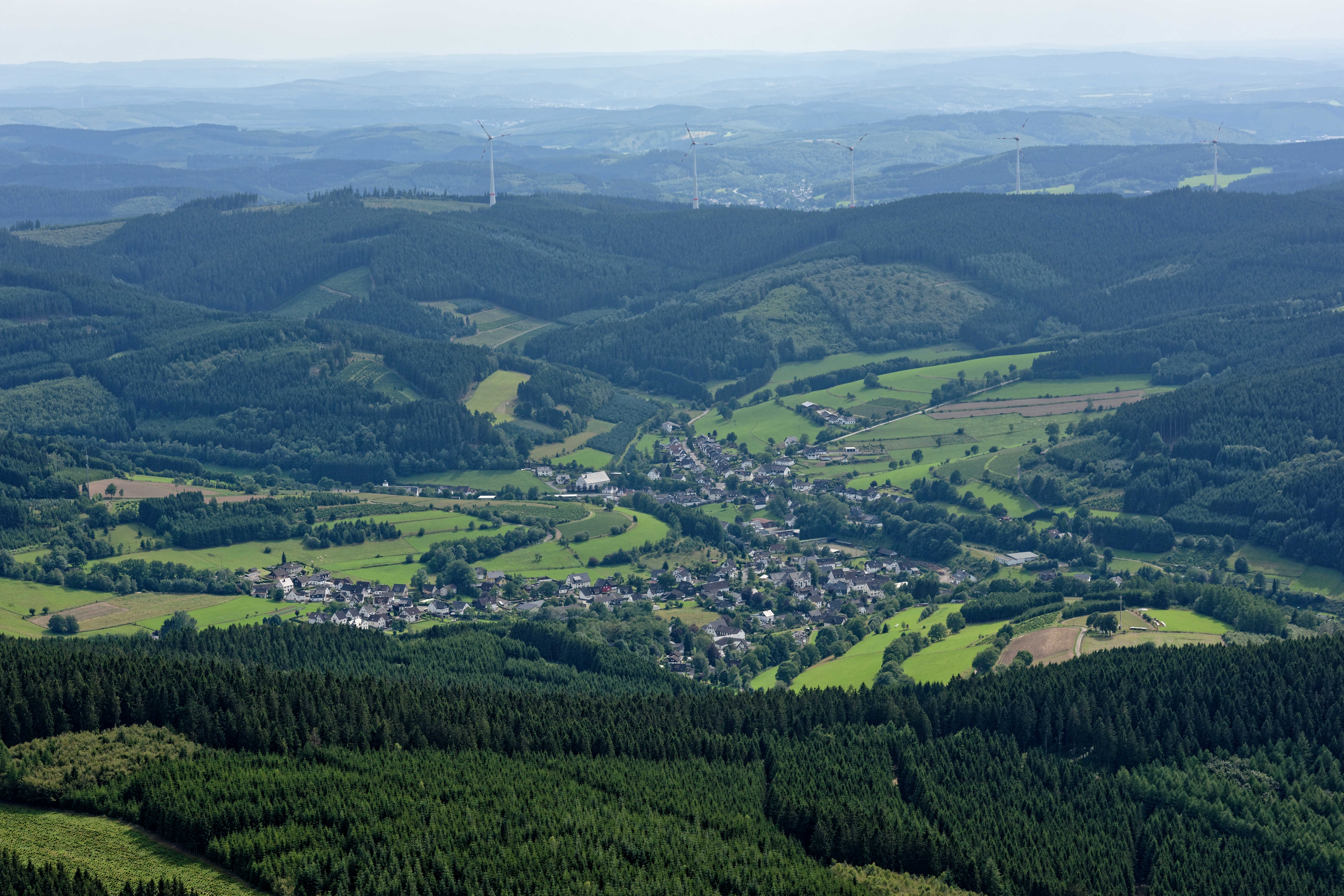 Luftaufnahme: Heinsberg, dahinter Windpark nördlich von Hilchenbach, Nordrhein-Westfalen